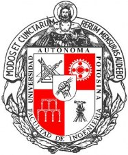 Facultad de Ingenieria de la Universidad Autonoma de San Luis Potosi